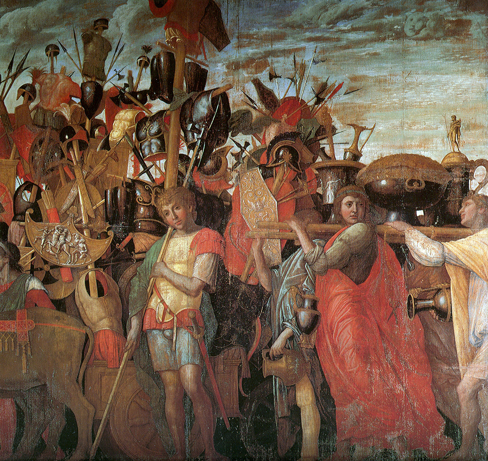 detail